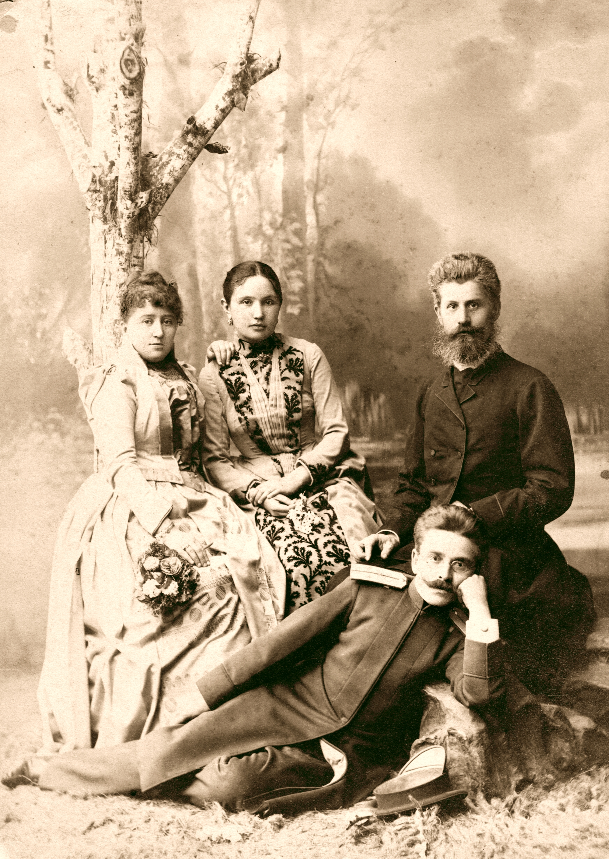 Ипполит Александрович Прощаков, Елизавета Ивановна Прощакова (Прохорова), в центре.